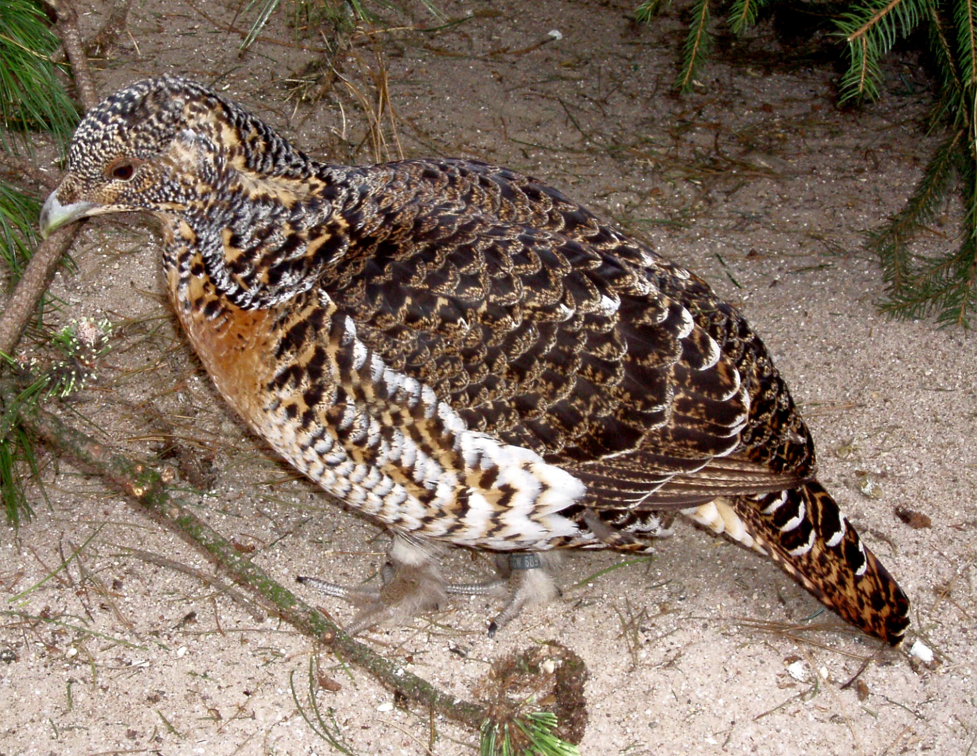 Auerhuhn